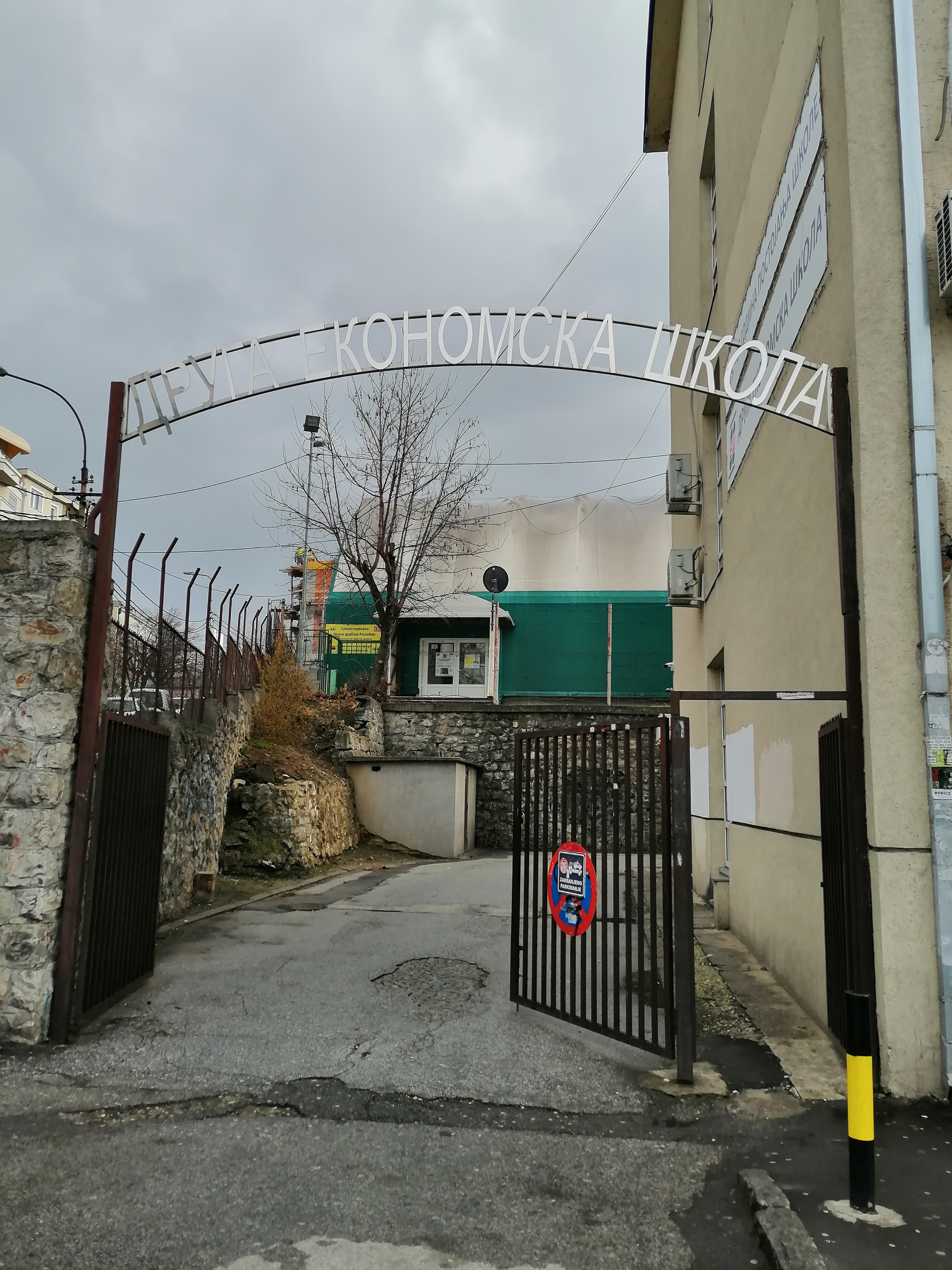 Srpski (latinica): Druga ekonomska škola u Beogradu